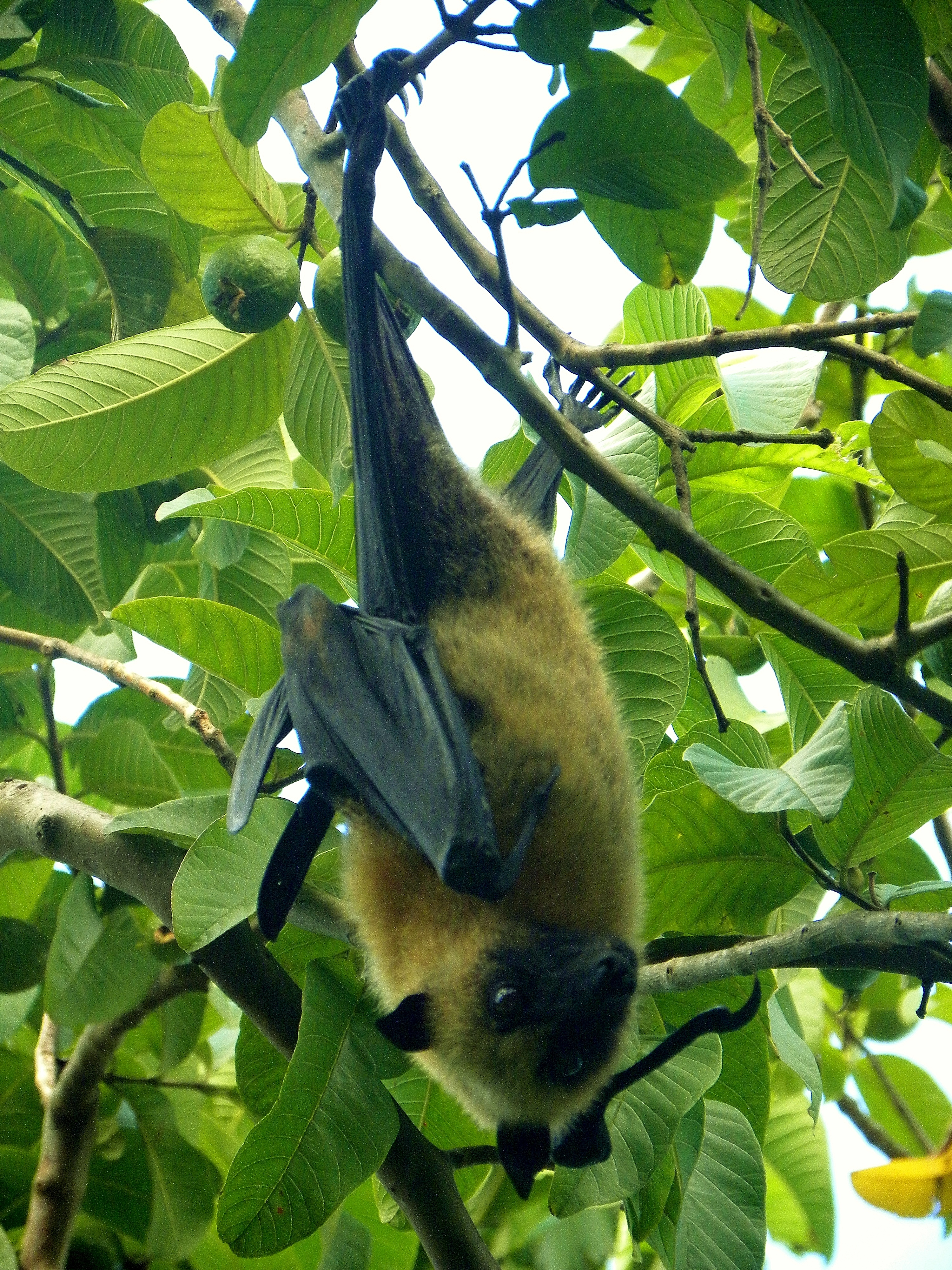 Photo de l'espèce Pteropus seychellensis comorensis